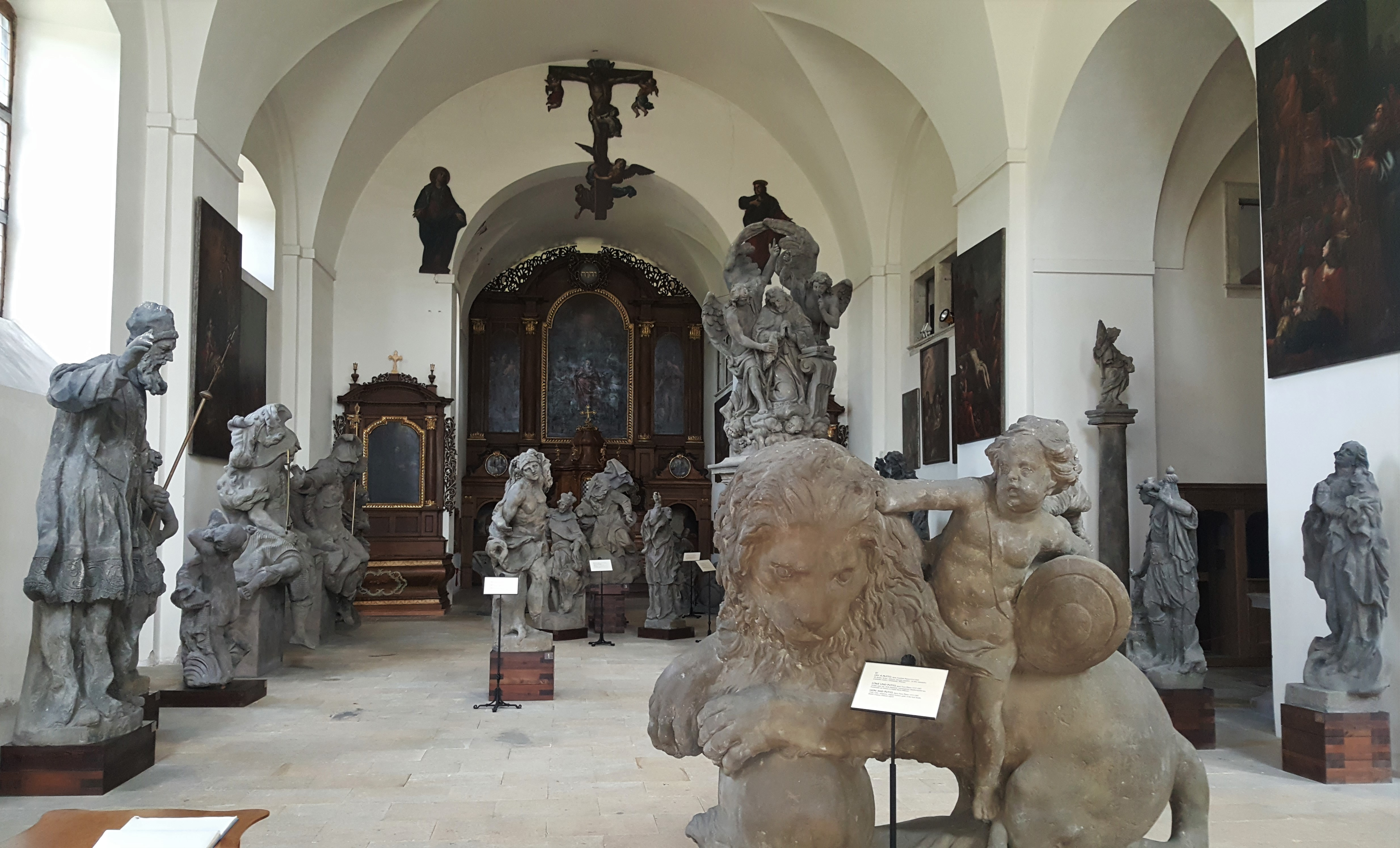 Interiér bývalého kapucínského kostela svatých Tří králů, dnes lapidárium barokních soch, Mnichovo Hradiště